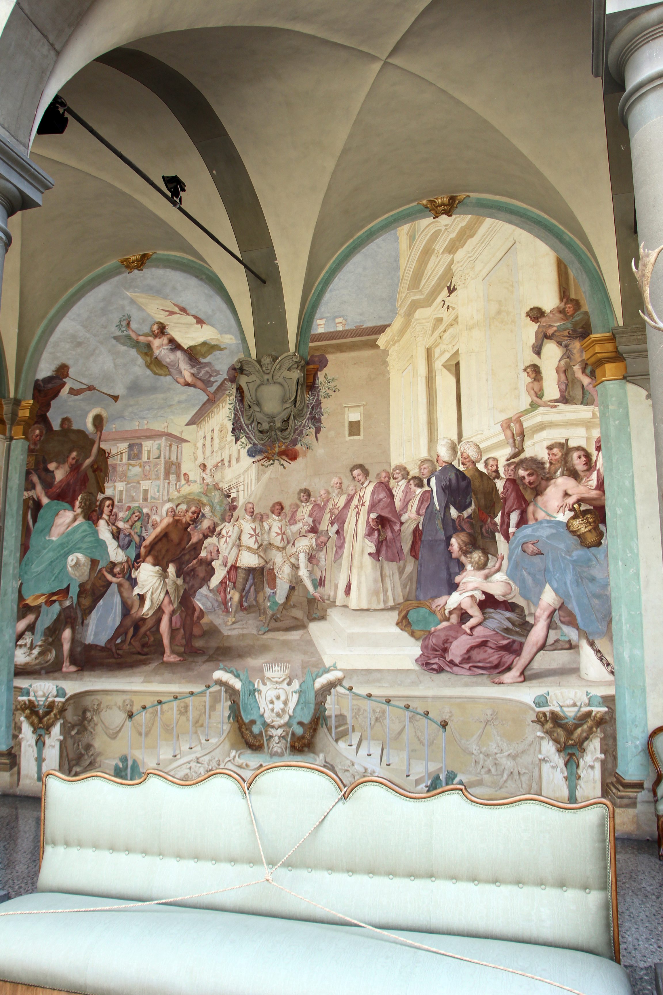 Villa medicea della Petraia - MIBAC The making of this document was supported by Wikimedia CH. (Submit your project!) For all the files concerned, please see the category Supported by Wikimedia CH. This is a photo of a monument which is part of cultural heritage of Italy.